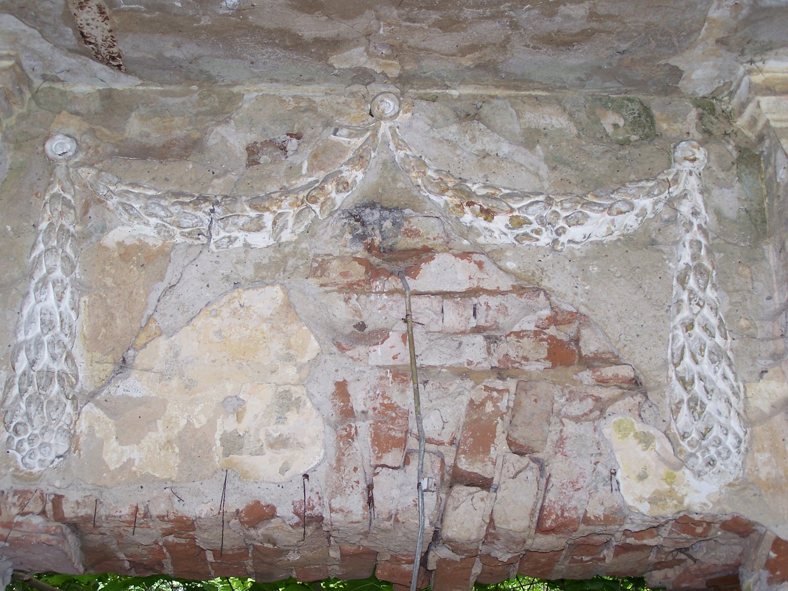 Polska, Lutynia, woj. wielkopolskie, powiat pleszewski, gmina Dobrzyca Ocalałe fragmenty sztukaterii dworku Lutyńskiech w Lutynii